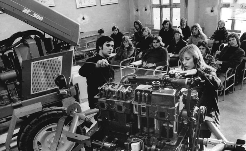 Langenstein, Ausbildungsklasse zum Agrotechniker ADN-ZB Link 25.11.75 Bez. Magdeburg: Zur Ausbildung der zukünftigen Agrotechniker und Mechanisatoren in der Betriebsschule des Volkseigenen Gutes Saatzucht Langenstein gehört auch das Kennenlernen landwirtschaftlicher Großgeräte. Lehrmeister Dieter Wolf erklärt hier den Lehrlingen an einem Schnittmodell die Arbeitsweise des Traktormotors ZT-300. siehe auch P1125-6N